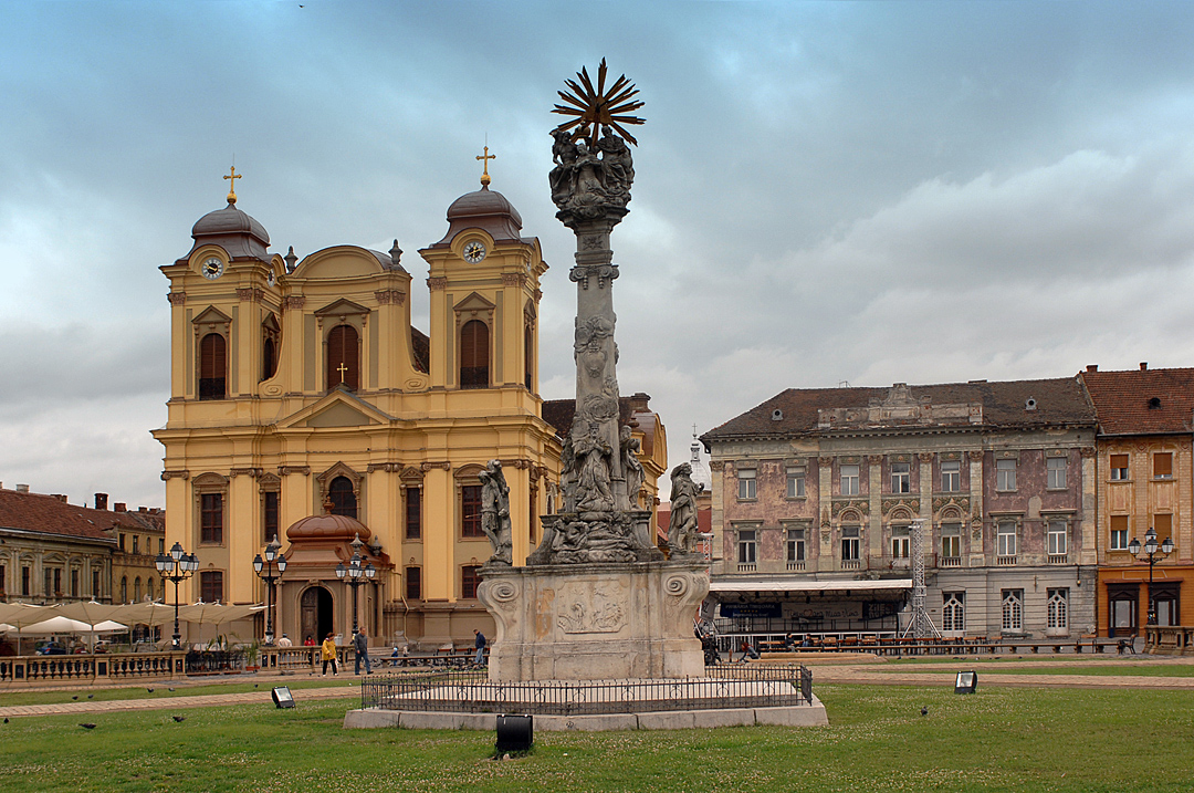 Piata Unirii 2005